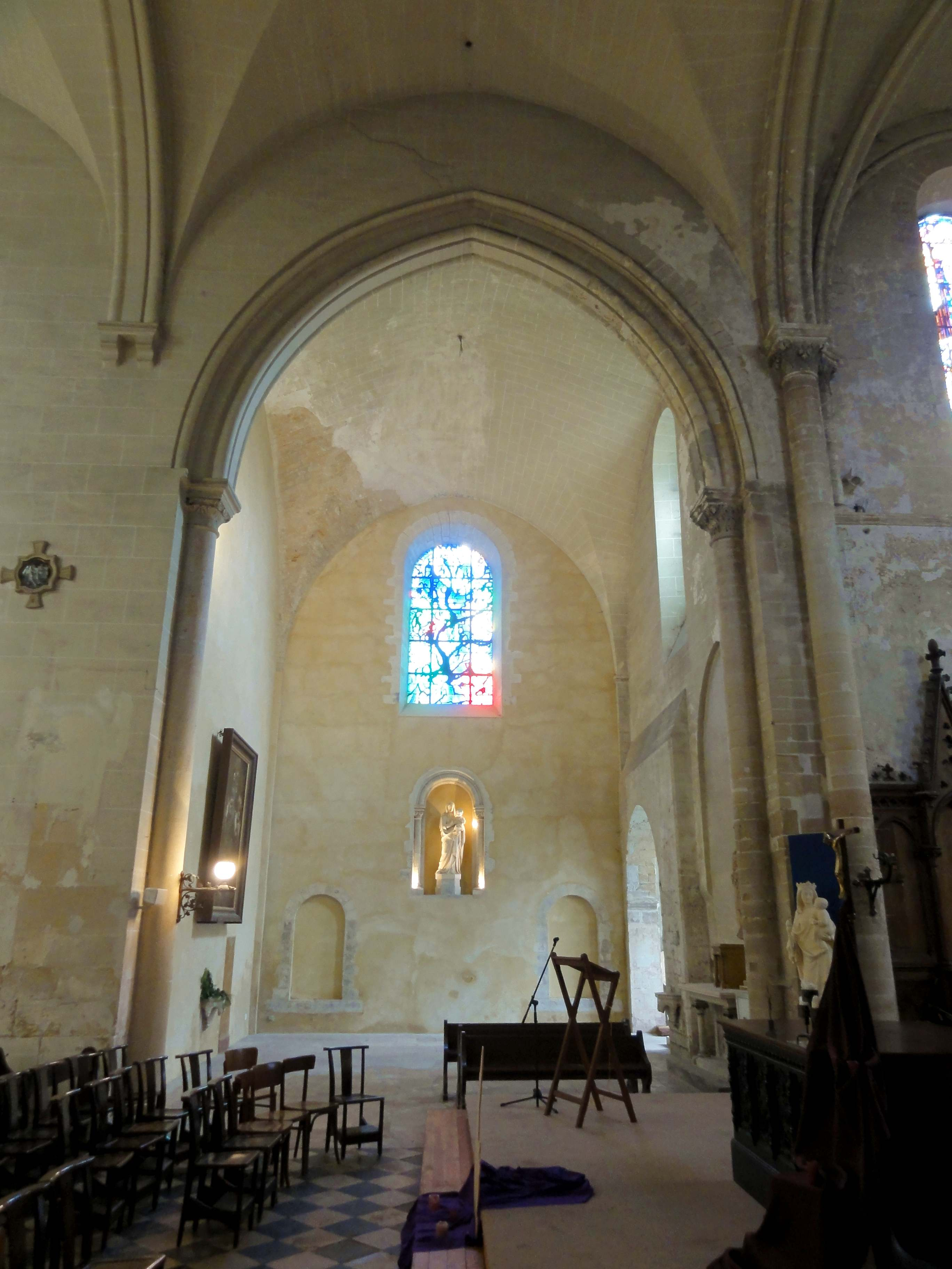 Voir titre.